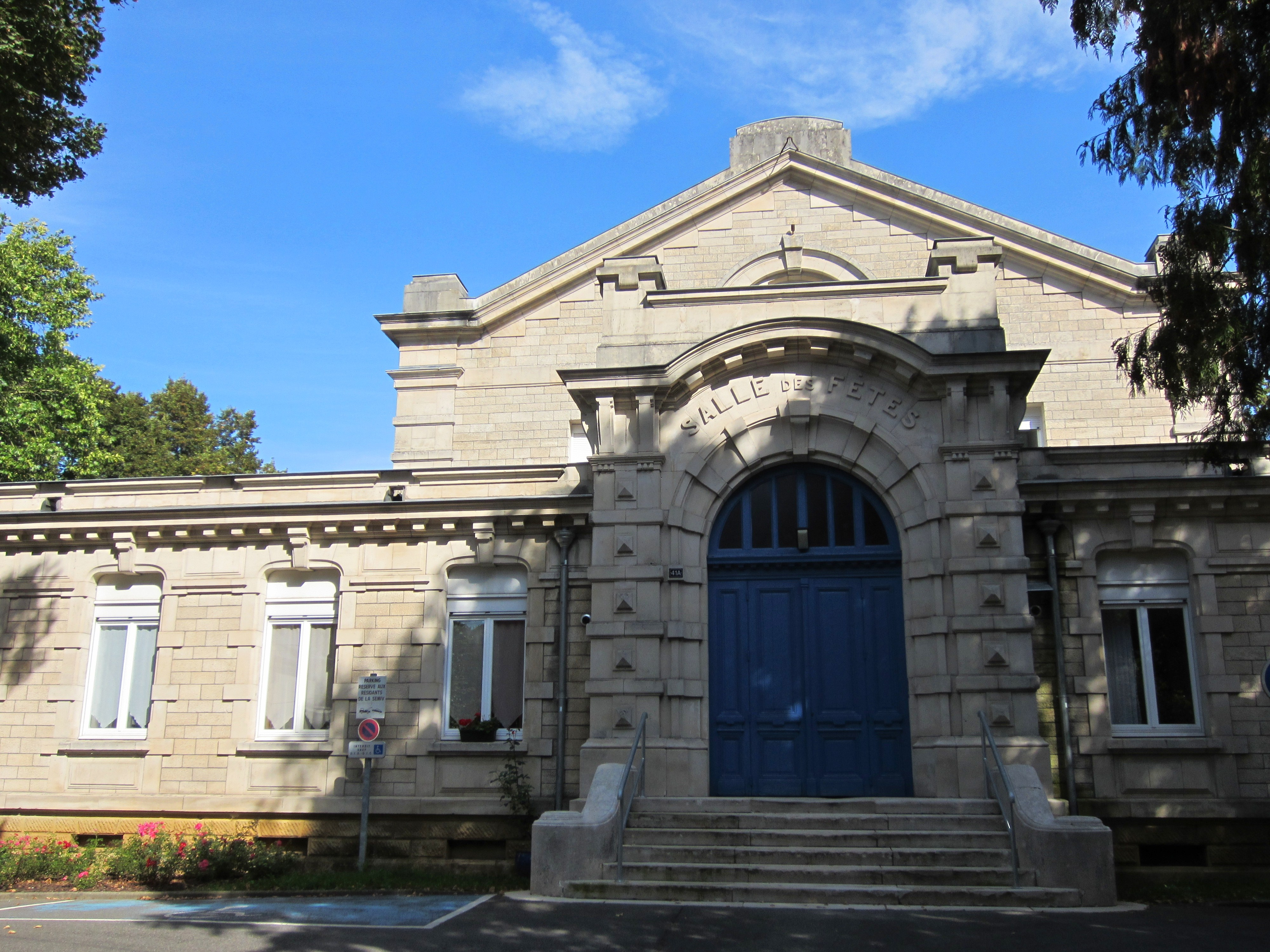 Description ancienne salle fetes Villerupt Date16 September 2011Sourcemon appareil photoAuthorAimelaimePermission (Reusing this file) ancienne salle fetes Villerupt